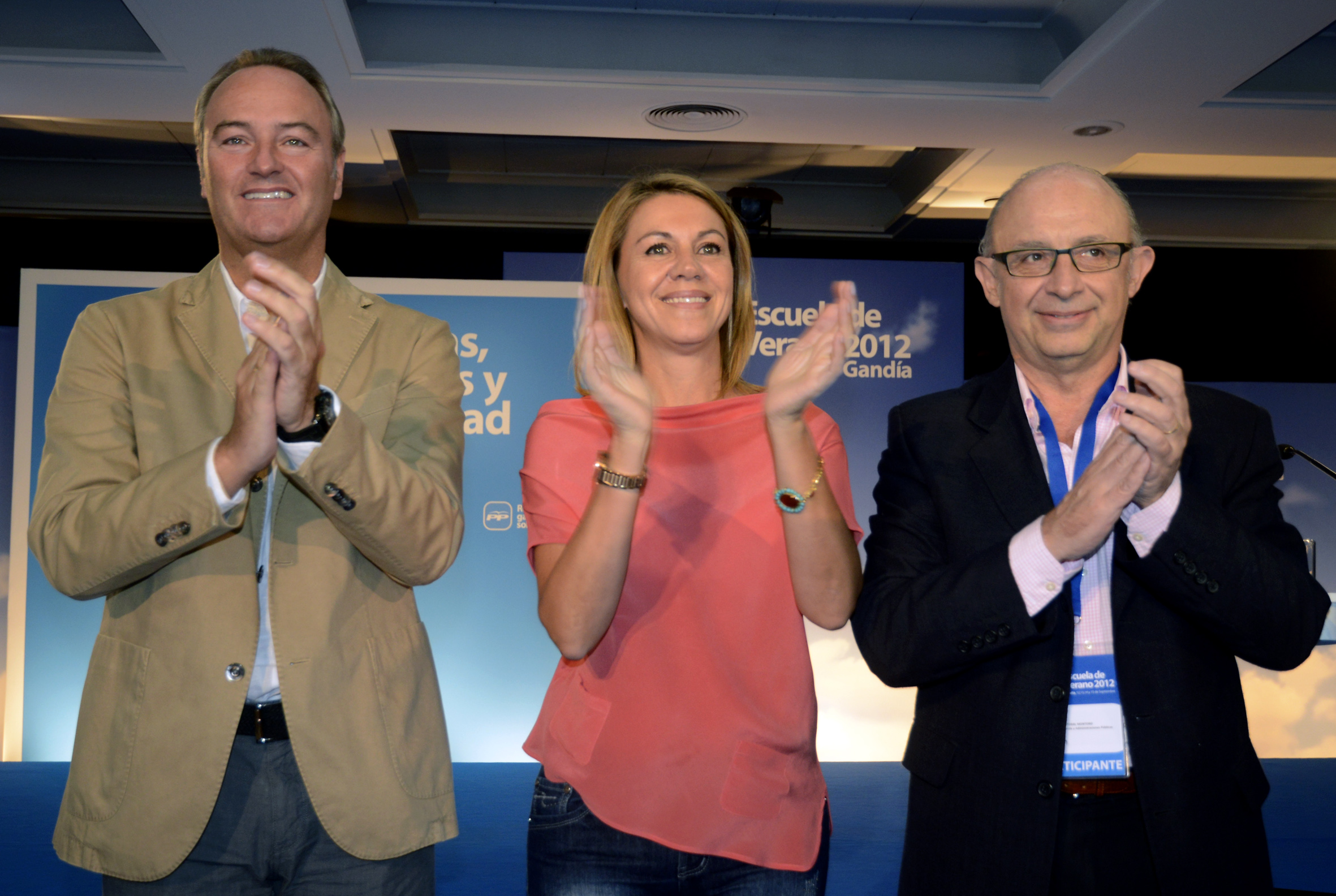 El presidente del Partido Popular de la Comunitat Valenciana, Alberto Fabra, junto a la secretaria general del Partido Popular, Mª Dolores Cospedal, clausuran el sábado, 15 de septiembre, la Escuela de Verano que el PP celebra en Gandía.